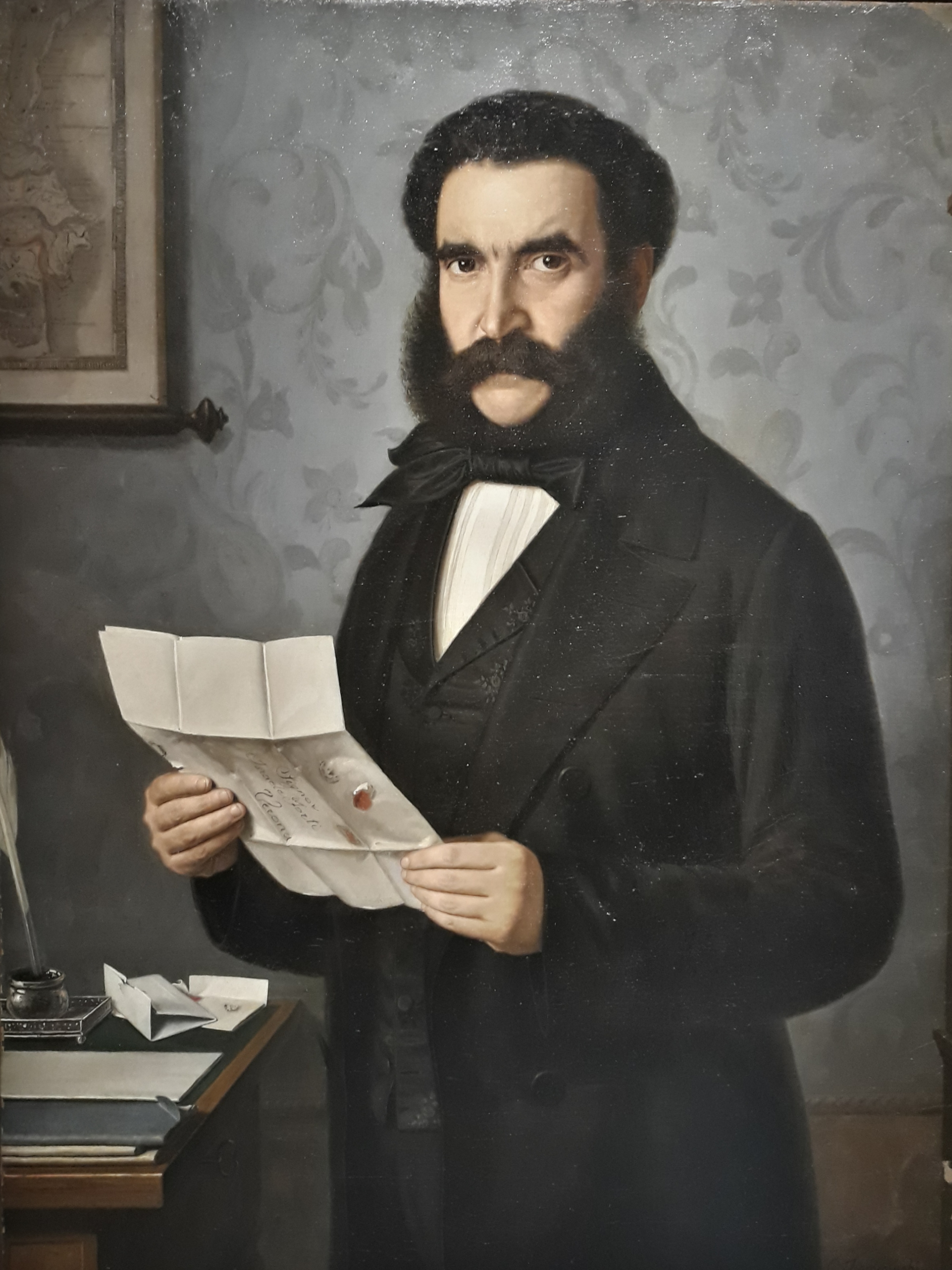 Ritratto di Israrele Forti di Giacomo Fiamminghi, 1854 (Olio su tela), Verona, Galleria d'arte moderna Achille Forti